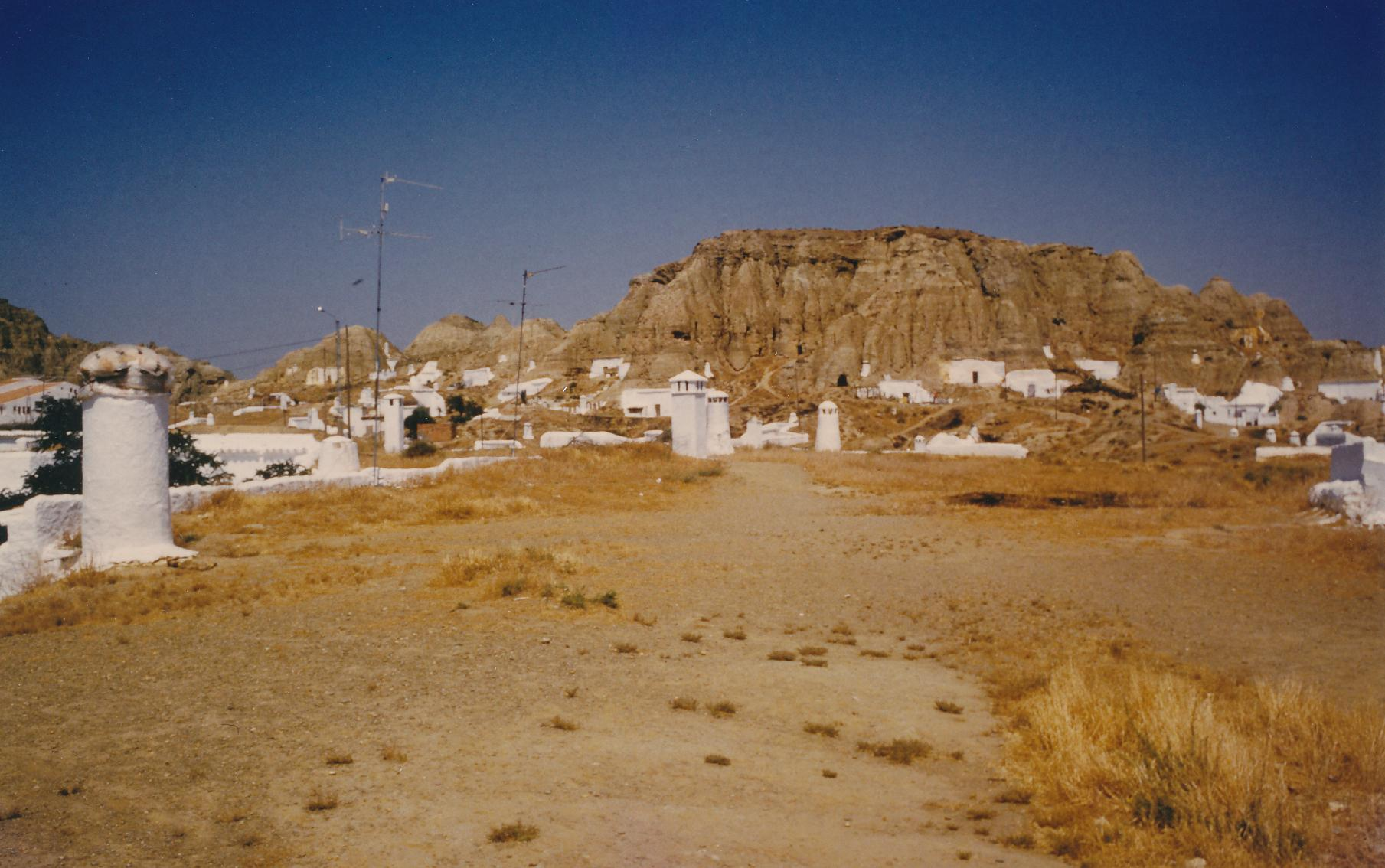 Höhlenwohnungen in Guadix Datum: 09/1984 Urheber: Michael Pfeiffer Quelle: privates Fotoalbum des Urhebers